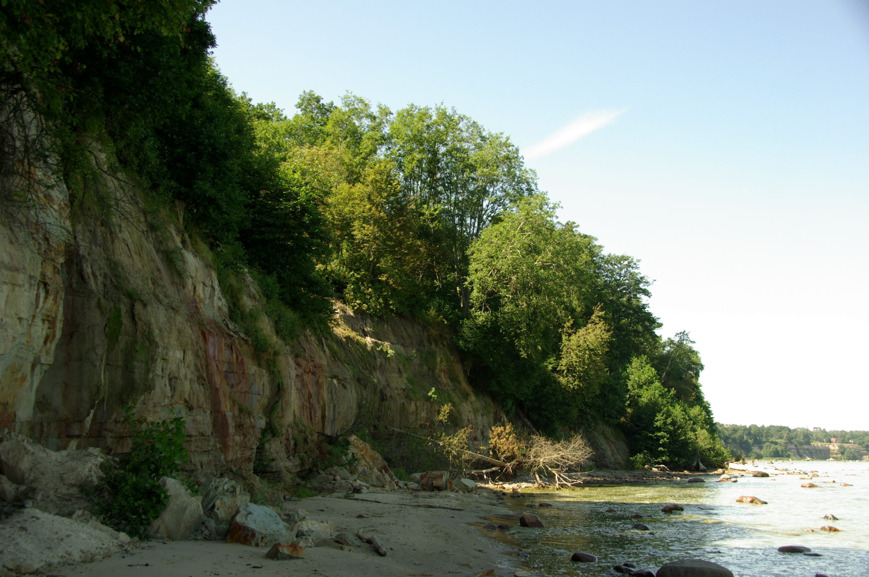 Rannamõisa paljand